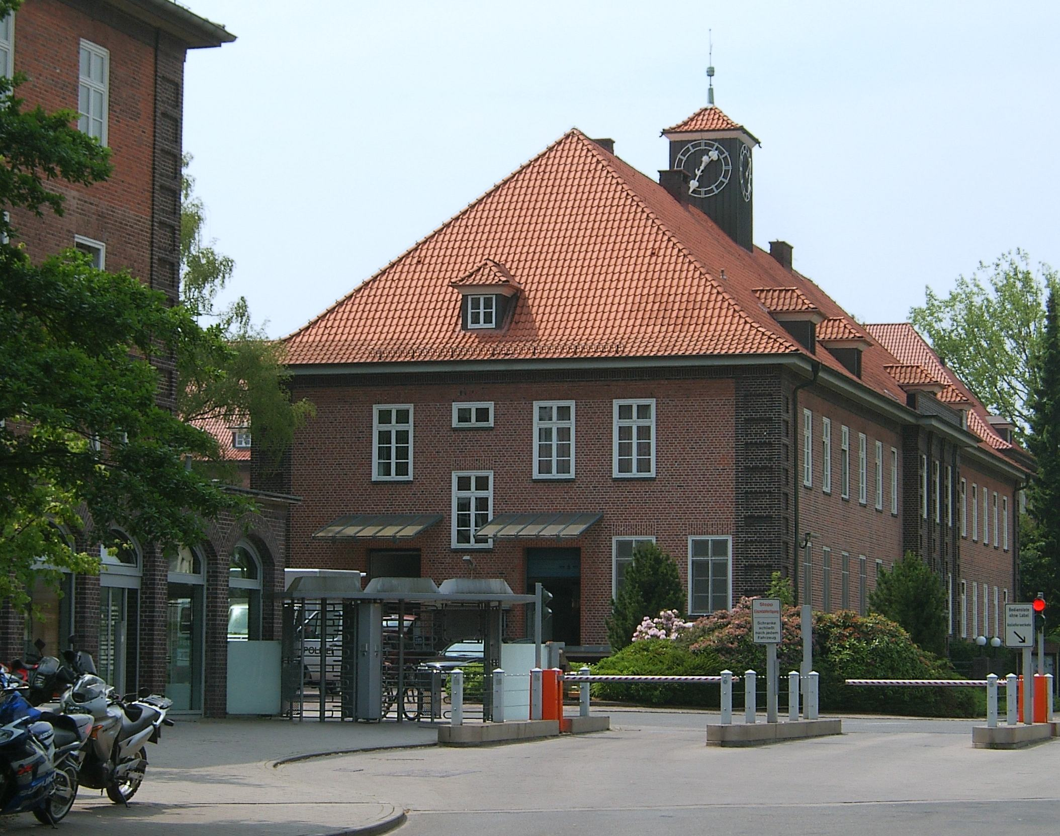 Hamburg, Polizeikaserne (Landespolizeischule). This is a photograph of an architectural monument.